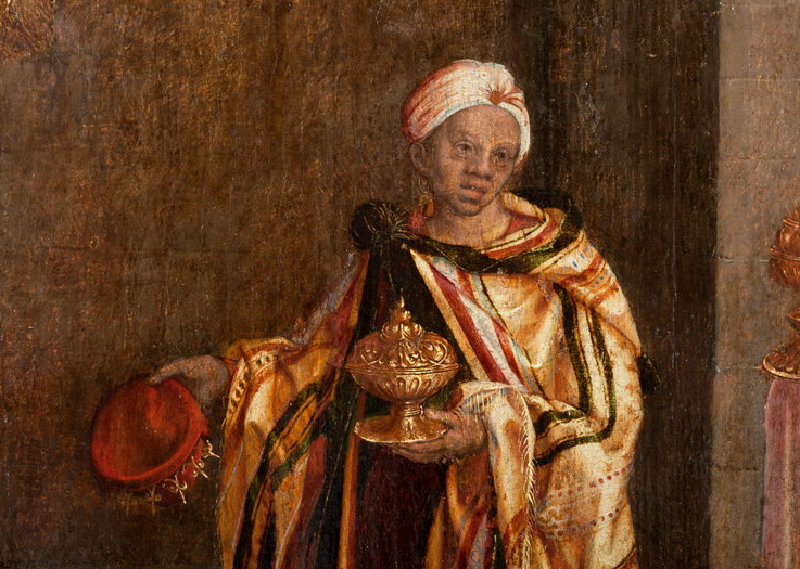 Rei mago negro, frequentemente identificado como Baltasar. Detalhe da Adoração dos Reis Magos por um seguidor de Vasco Fernandes na Igreja de São Miguel de Freixo de Espada à Cinta.